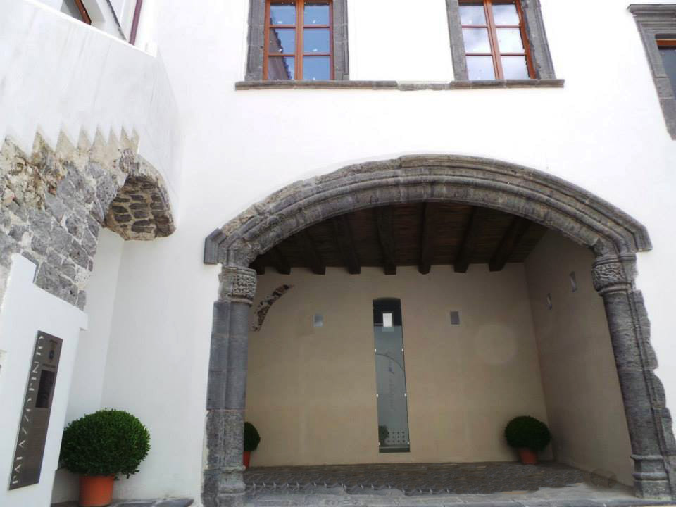 L'arco catalano di palazzo Pinto